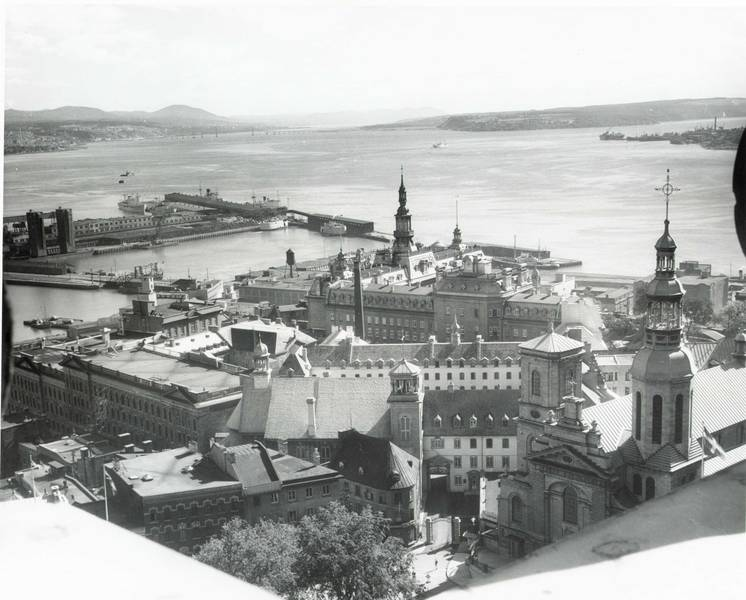 Séminaire de Québec au 20e siècle